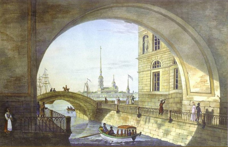 Вид на Эрмитажный мост. Литография. 1820-е гг